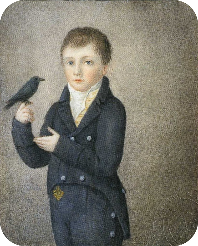 Hrabě František Vincenc Des Fours Walderode (1806-1869) - obraz od neznámého autora (kol. r. 1815)